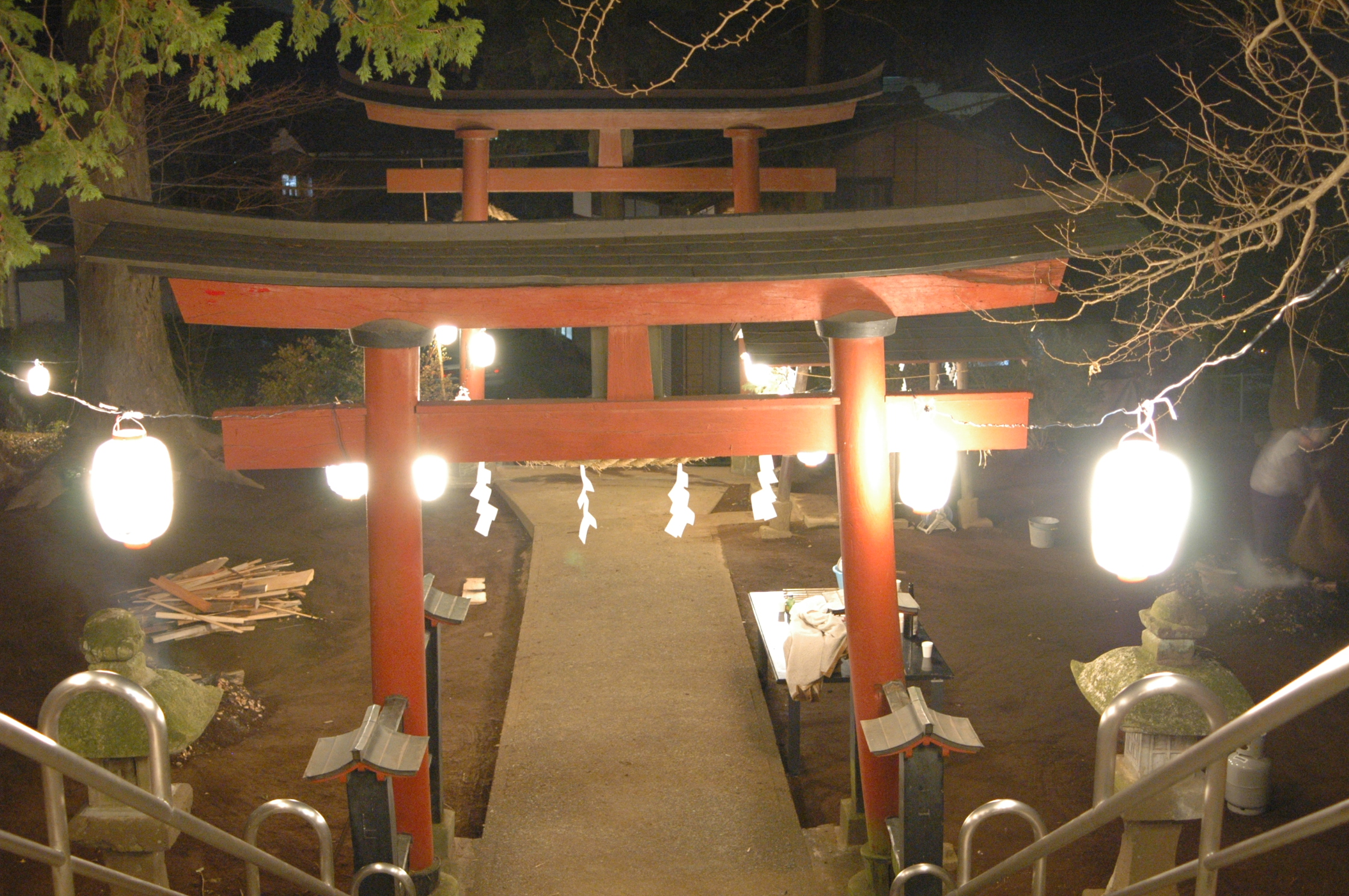 大晦日の夜4